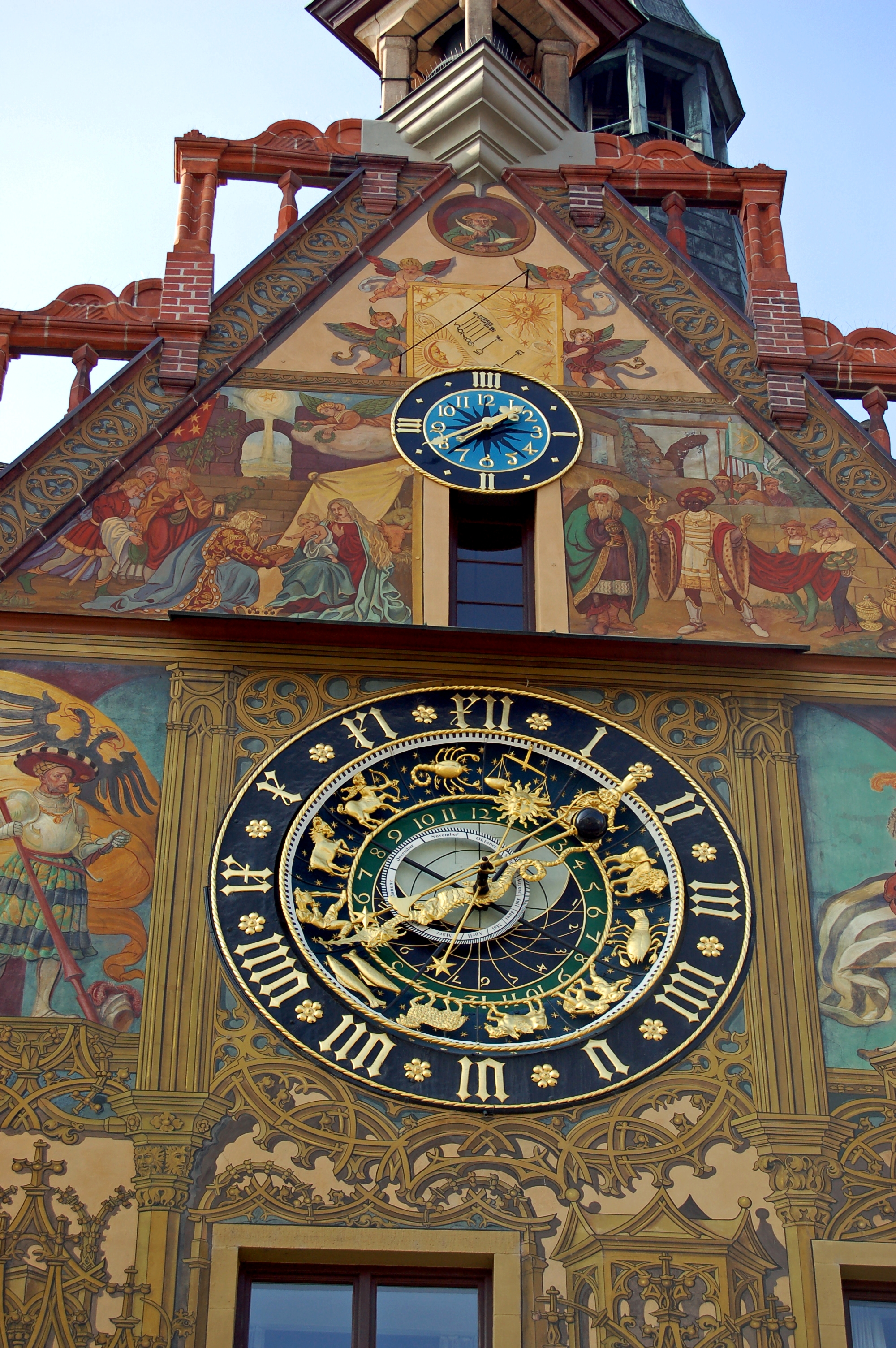 Der älteste Teil des heutigen Rathauses (das südöstliche Hauptgebäude) wurde als »Neues Kaufhaus« 1370 errichtet. Ab 1419 wurde es als Rathaus bezeichnet. Im 15. Jahrhundert erhielt der Ratssaal Fenster in Gotik-Architektur. Als Highlight ist die um 1520 angebrachte astronomische Uhr zu betrachten. Die Fassadenbemalung zeigt Darstellungen von Geboten, Tugenden und Lastern. Durch einen Brand 1944 wurde das Innere des Rathauses bis auf Erdgeschoss und 1. Stock des Südflügels zum größten Teil zerstört. Im Treppenhaus ist eine Nachbildung des Fluggerätes des »Schneiders von Ulm« zu sehen.